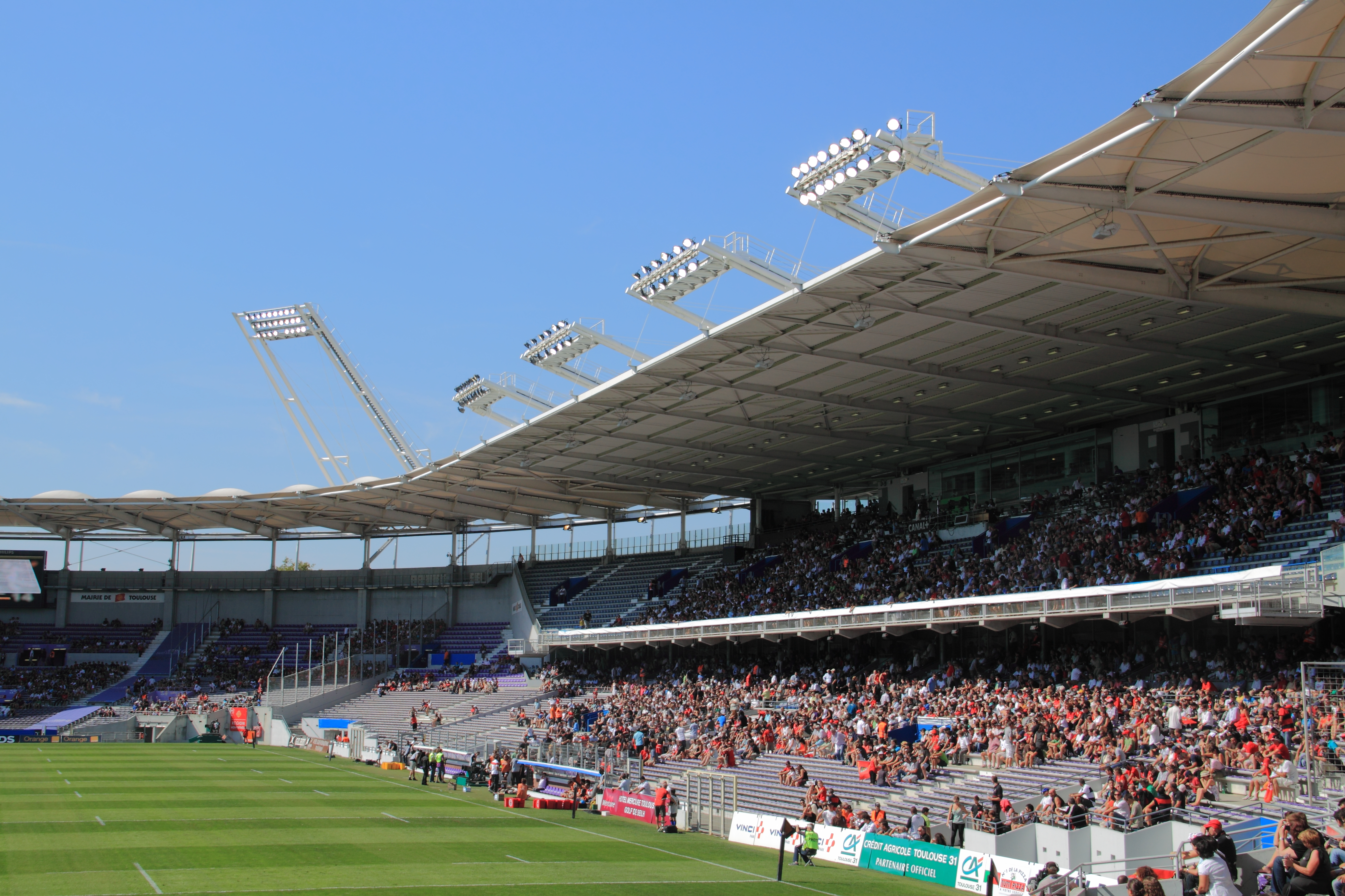 Vue large du Stadium avant le coup d'envoi du match de top 14 Stade toulousain / Racing Métro 92 du 10 septembre 2011.